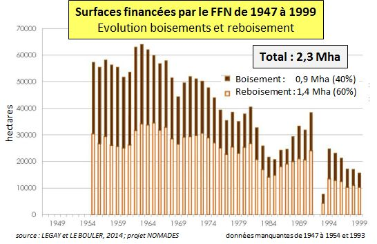 d'après LEGAY et LE BOULER, 2014 ; Eléments d'histoire et de répartition géographique des essences forestières introduites en France métropolitaine ; projet NOMADES ; fascicule 1